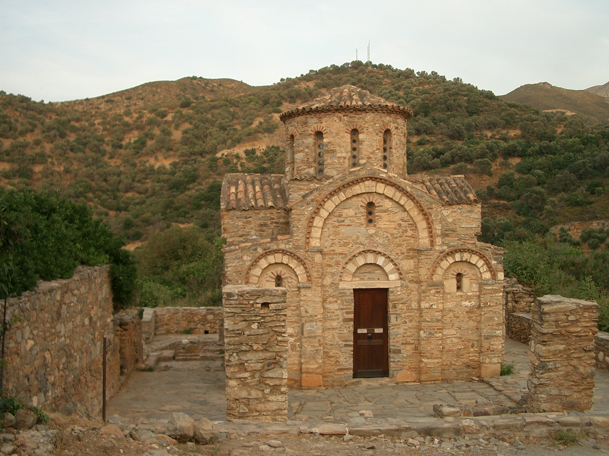 Motiv: Byzantinische Kapelle in Fodele Kreta Ort: Fodele, Kreta Kamera: Casio Kameras